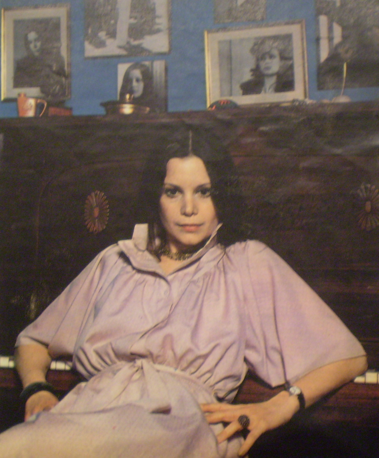 Luisina Brando